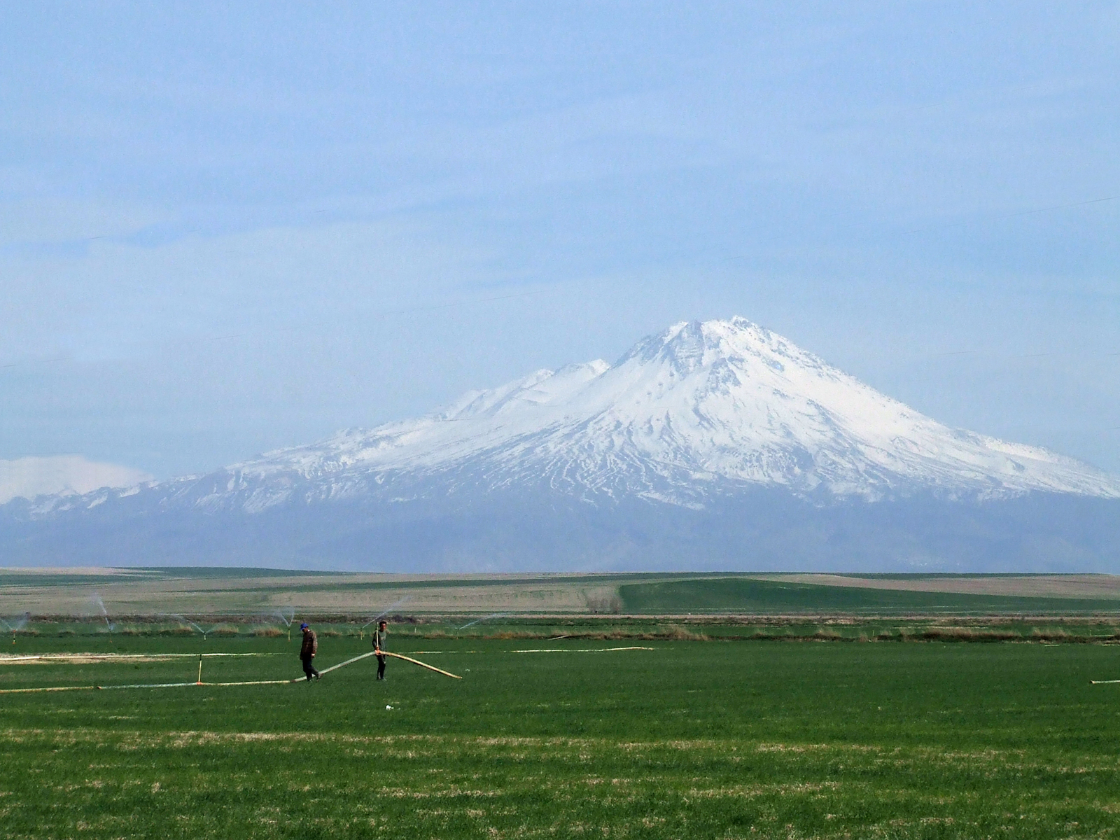 Der Vulkan Hasan Dagi in Kapadokien Sonstiges: Aufnahme anlässlich der totalen Sonnenfinsternis